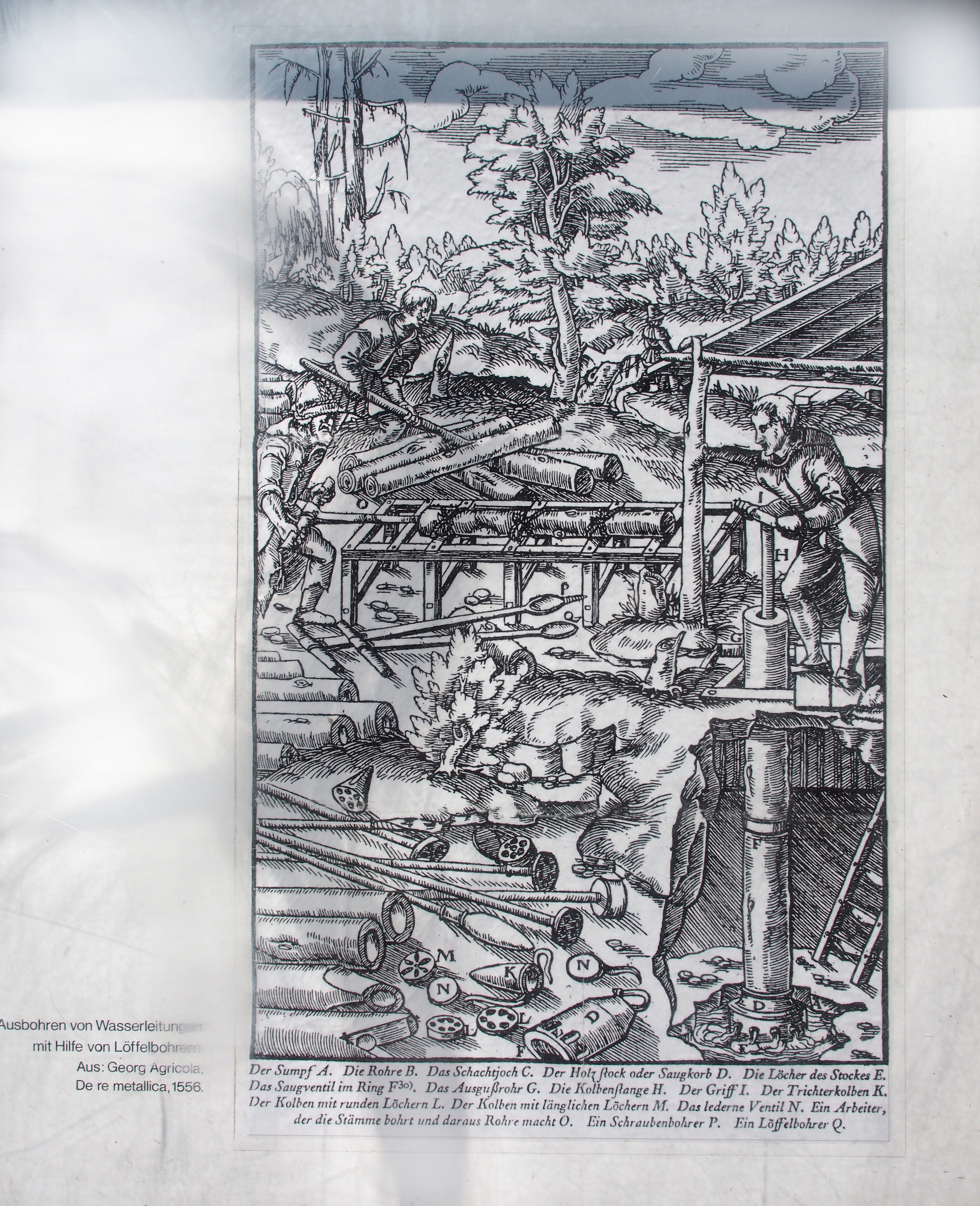 Grafische Darstellung: Ausbohren von Wasserleitungen mit Hilfe von Löffelbohrern